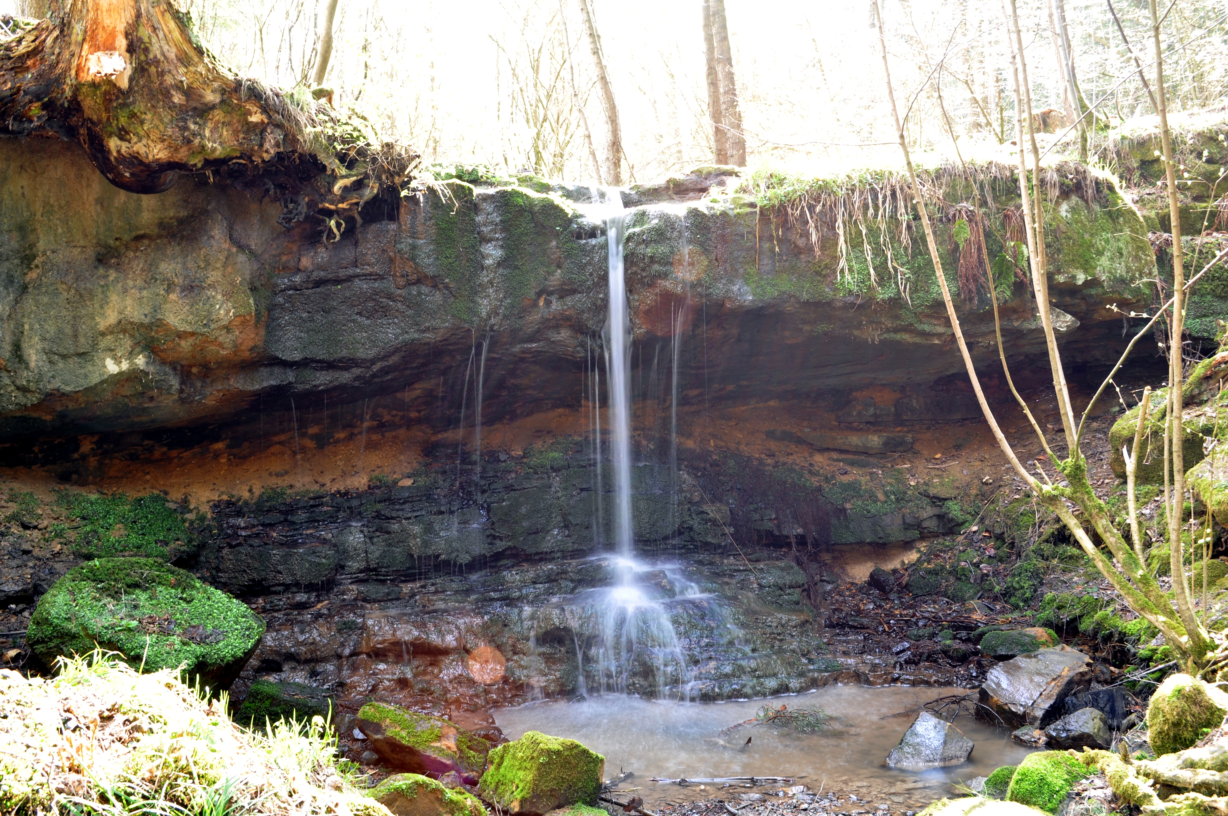 Pfersag Wasserfall bei Ebneth (Burgkunstadt)